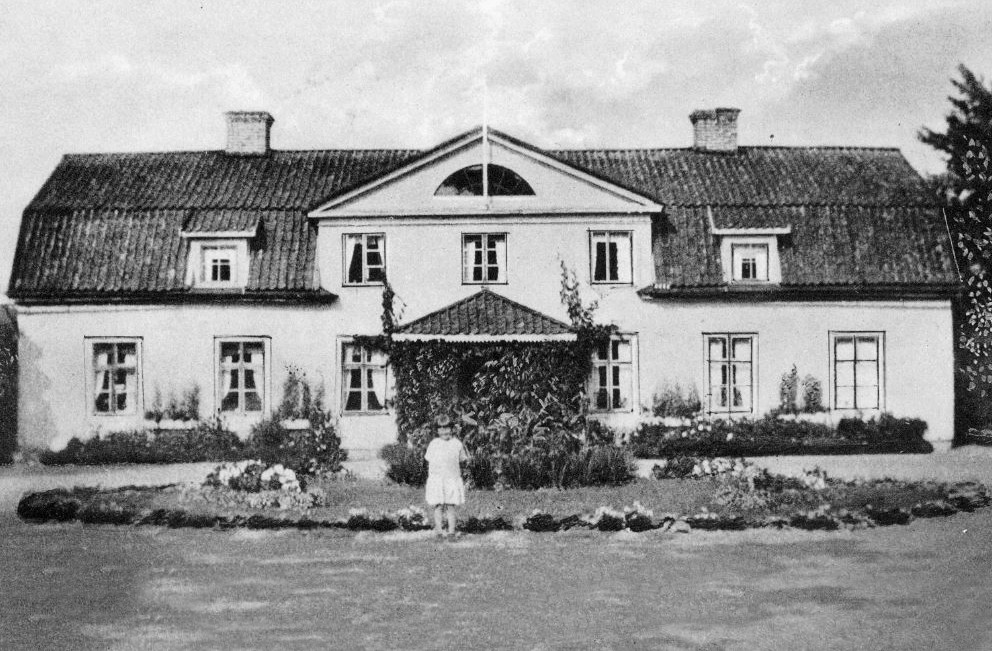 Vrå gård, huvudbyggnad